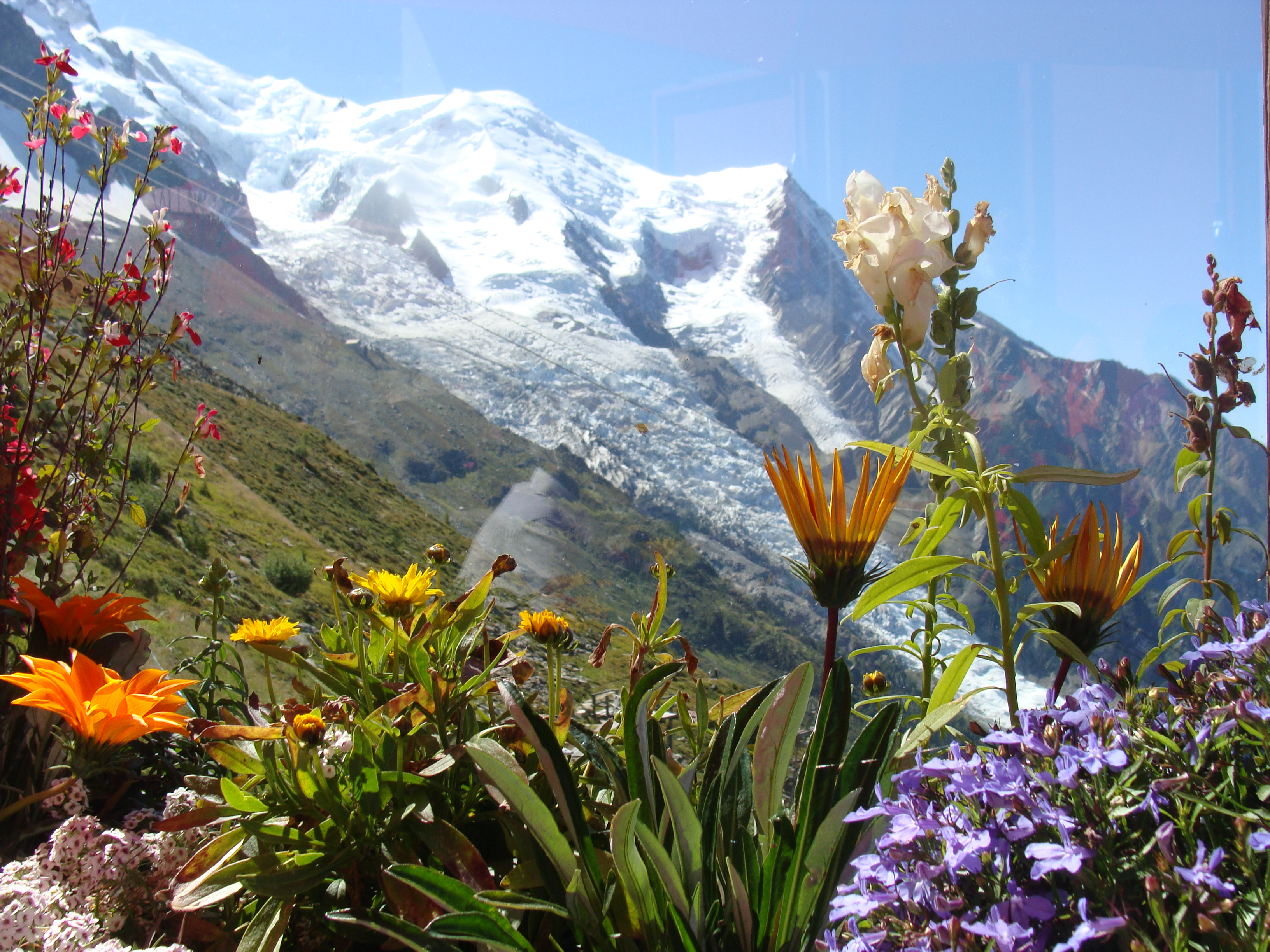 Ranskan Alppien kasvillisuus